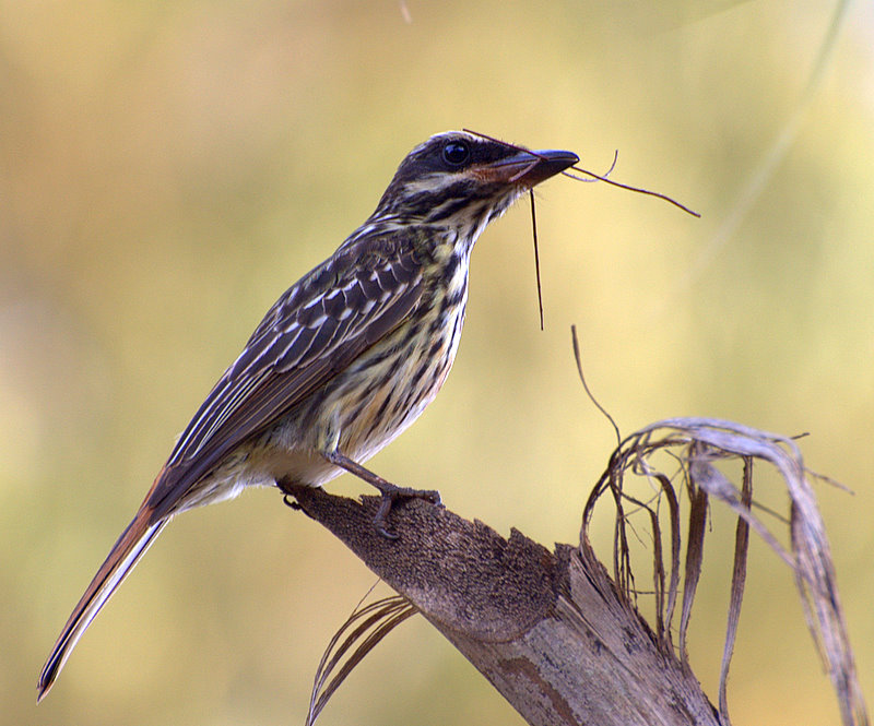 Myiodynastes maculatus No sitio de Ney Alcântara, no municipio de Sarutaiá-SP